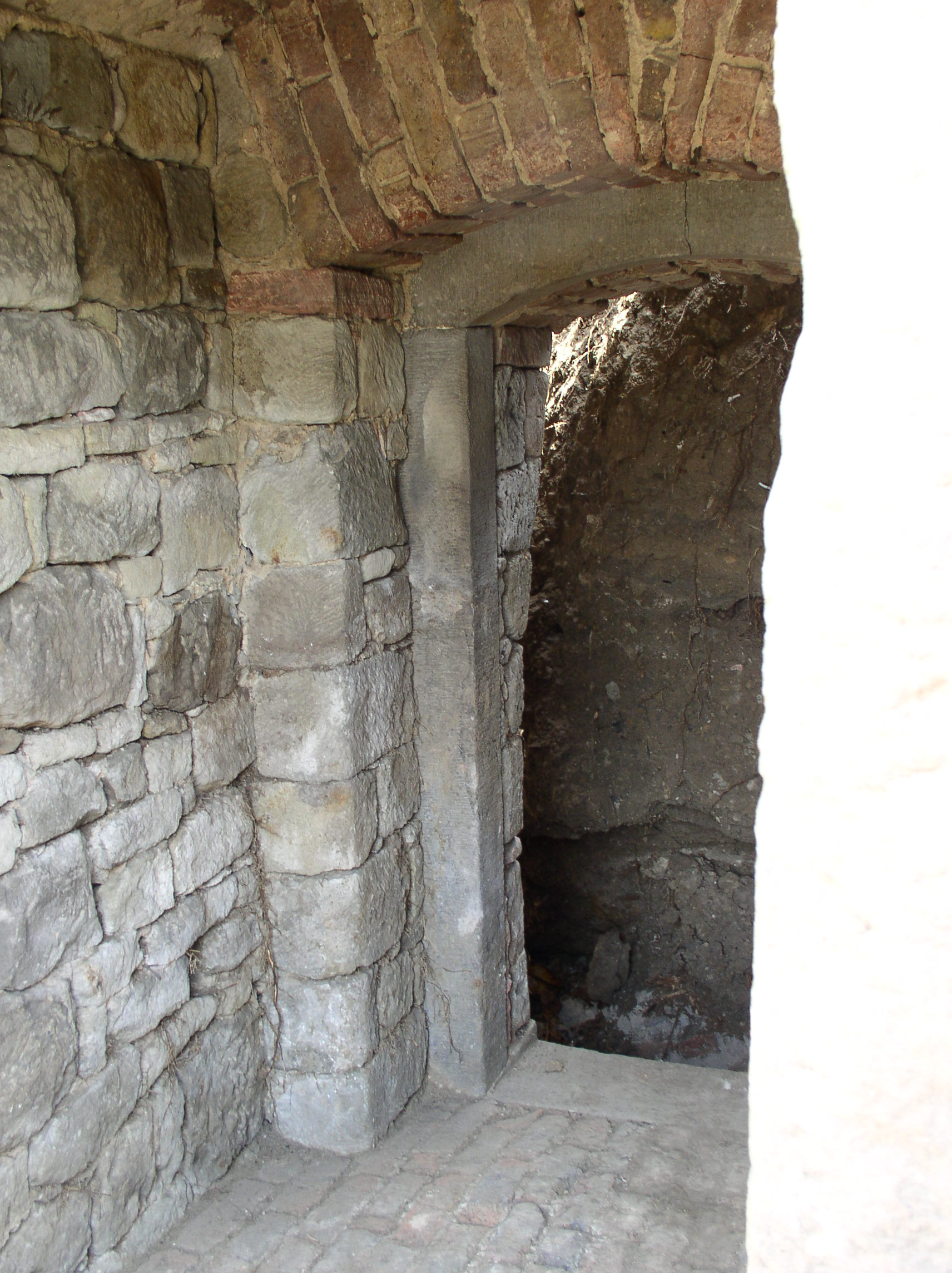 Ruine eines mittelalterlichen Wartturms in Frankfurt am Main, Eingangsbereich.